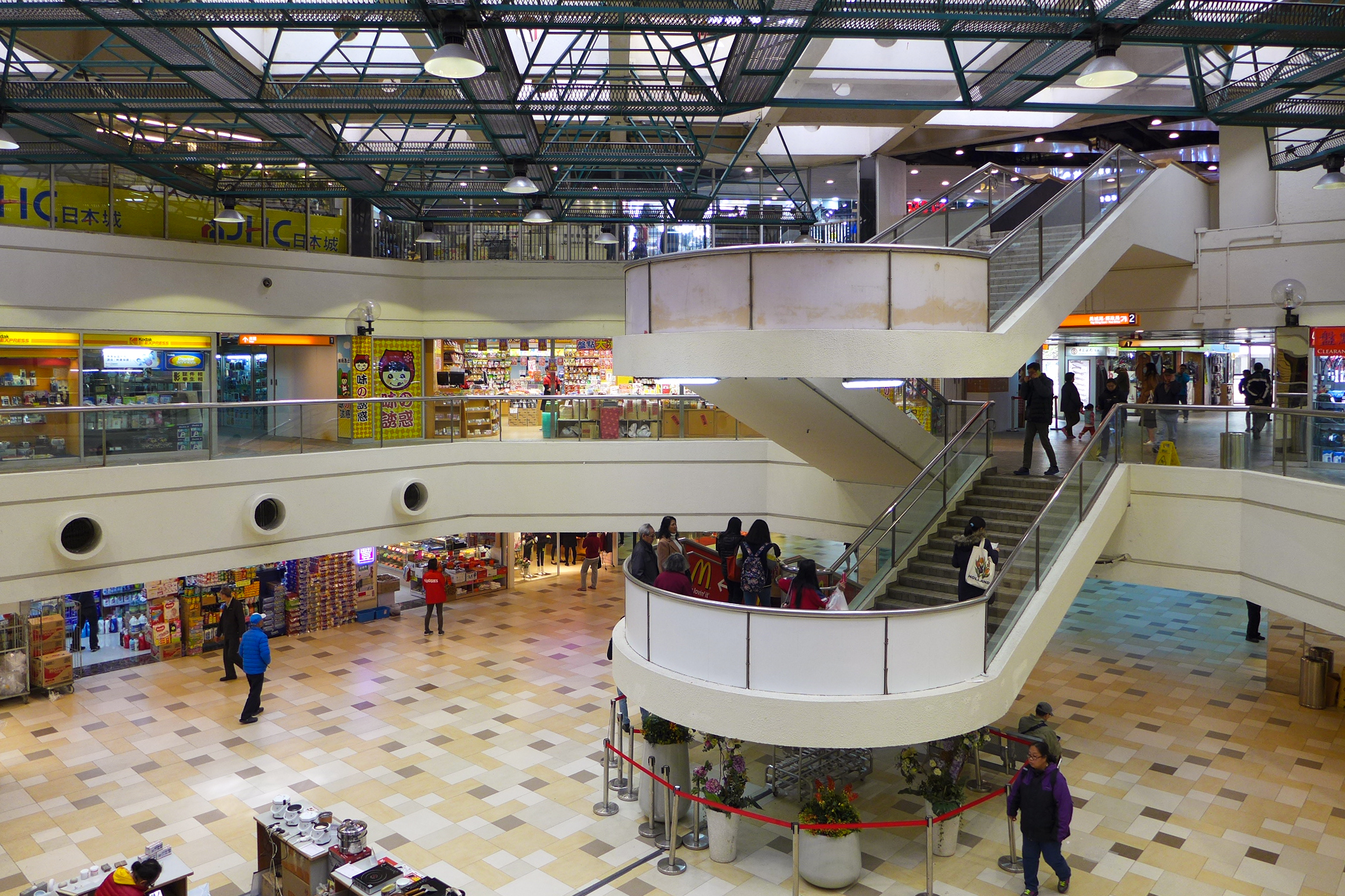 Mei Lam Shopping Centre Void